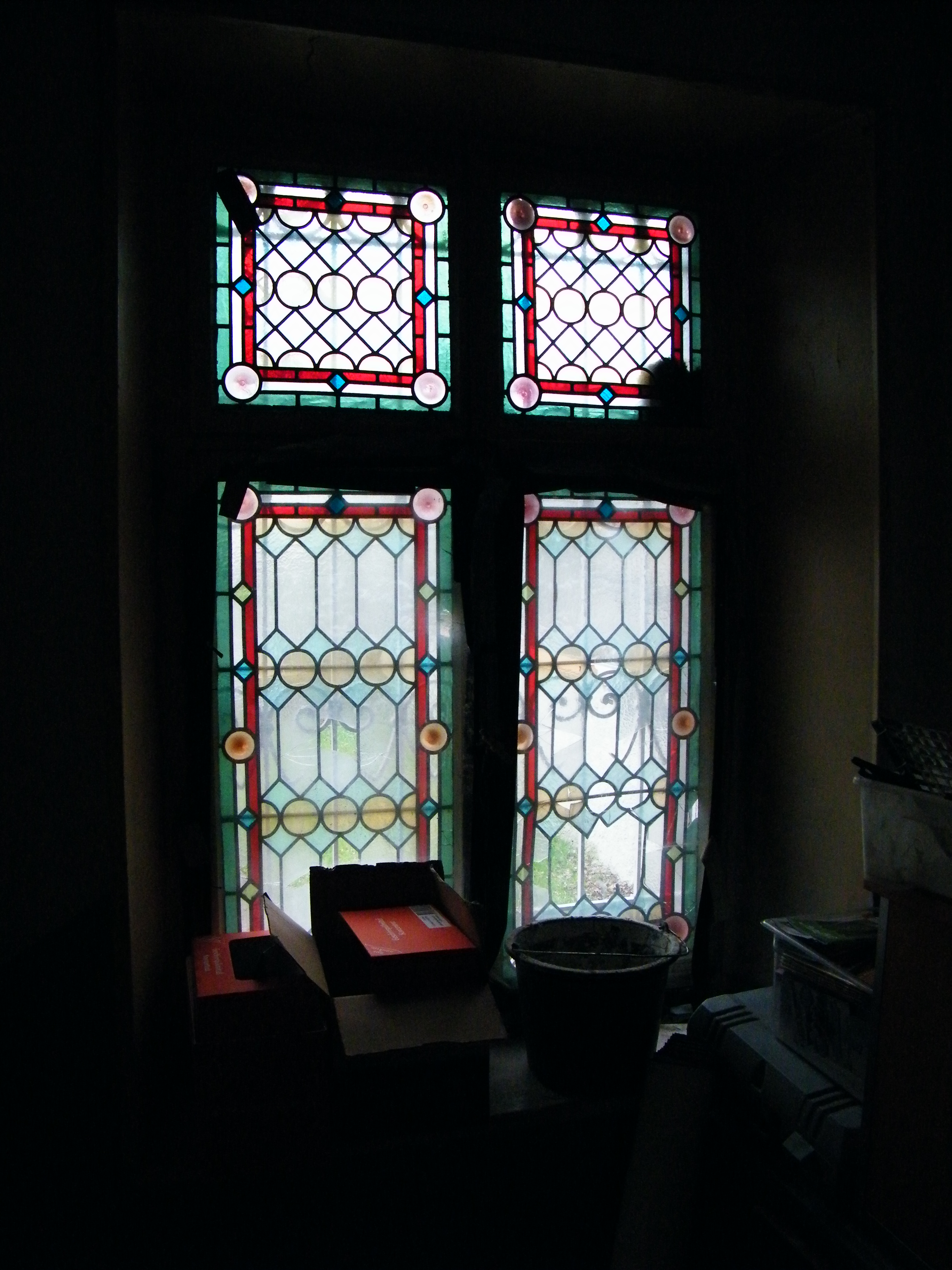 Fenster, Künstlerhaus Kempten